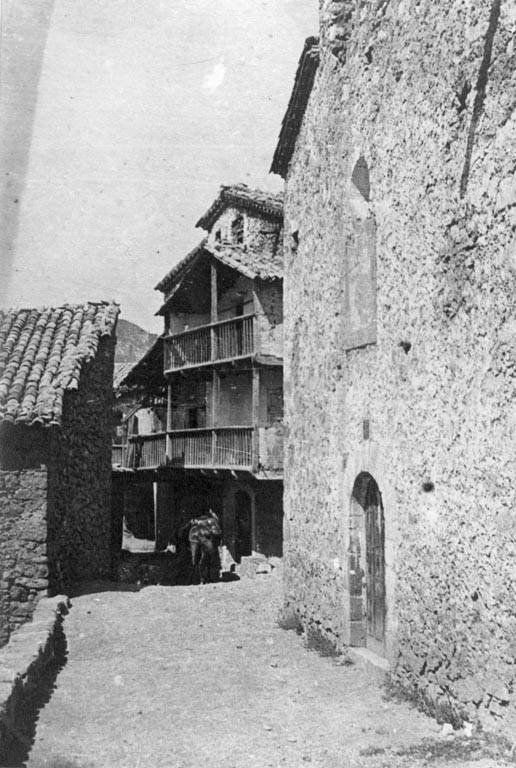 Carrer de Cornellana. Cèsar August Torras i Ferreri (12-1926)